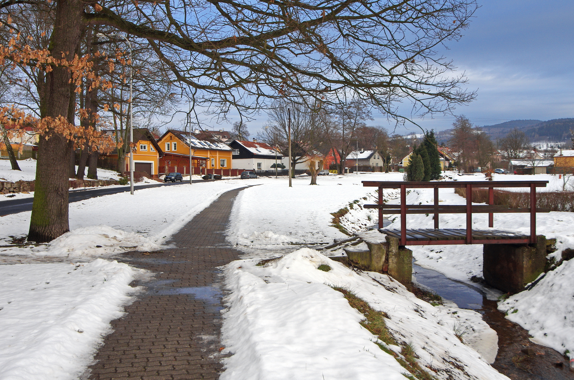 Dolní Rychnov, pohled na obec, okres Sokolov